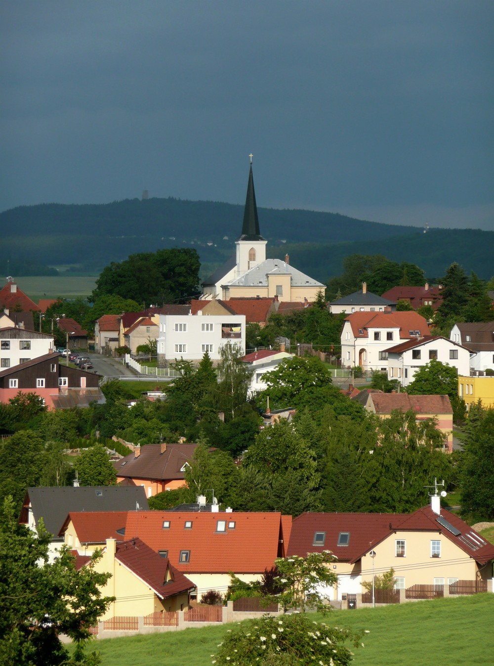 Litice a kostel sv. Petra a Pavla, pohled od západu, v pozadí zřícenina hradu Radyně. Plzeň, Česká republika